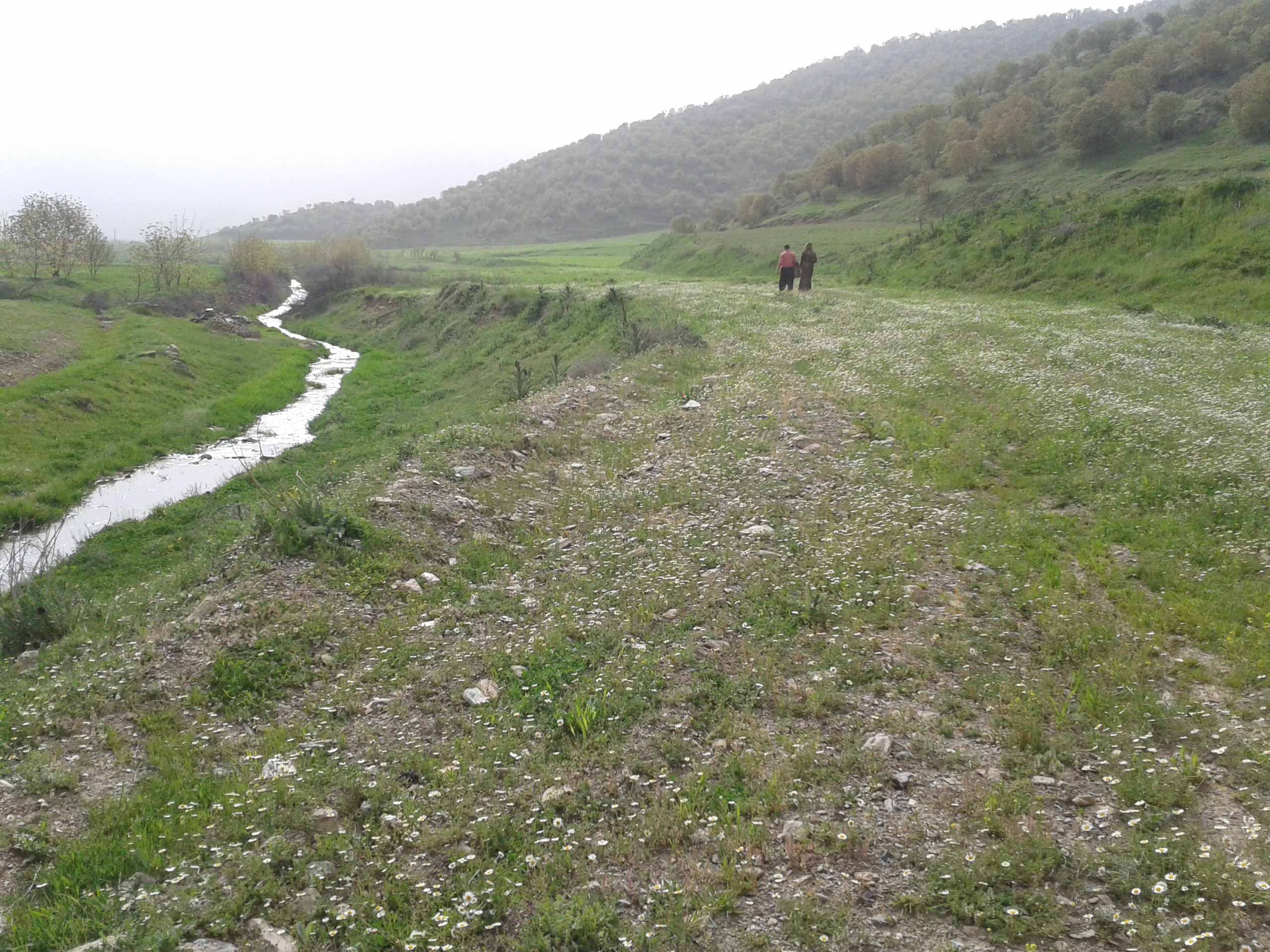 کوردیی ناوەندی: دەشتی سێف، مەریوان، کوردستان